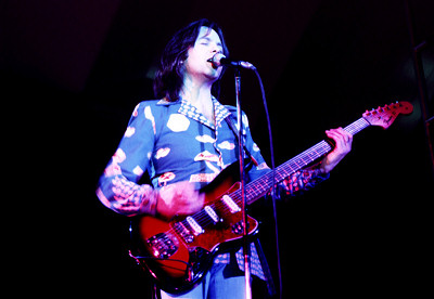 Eric Stewart, 10CC, Njårdhallen, Oslo, Norway